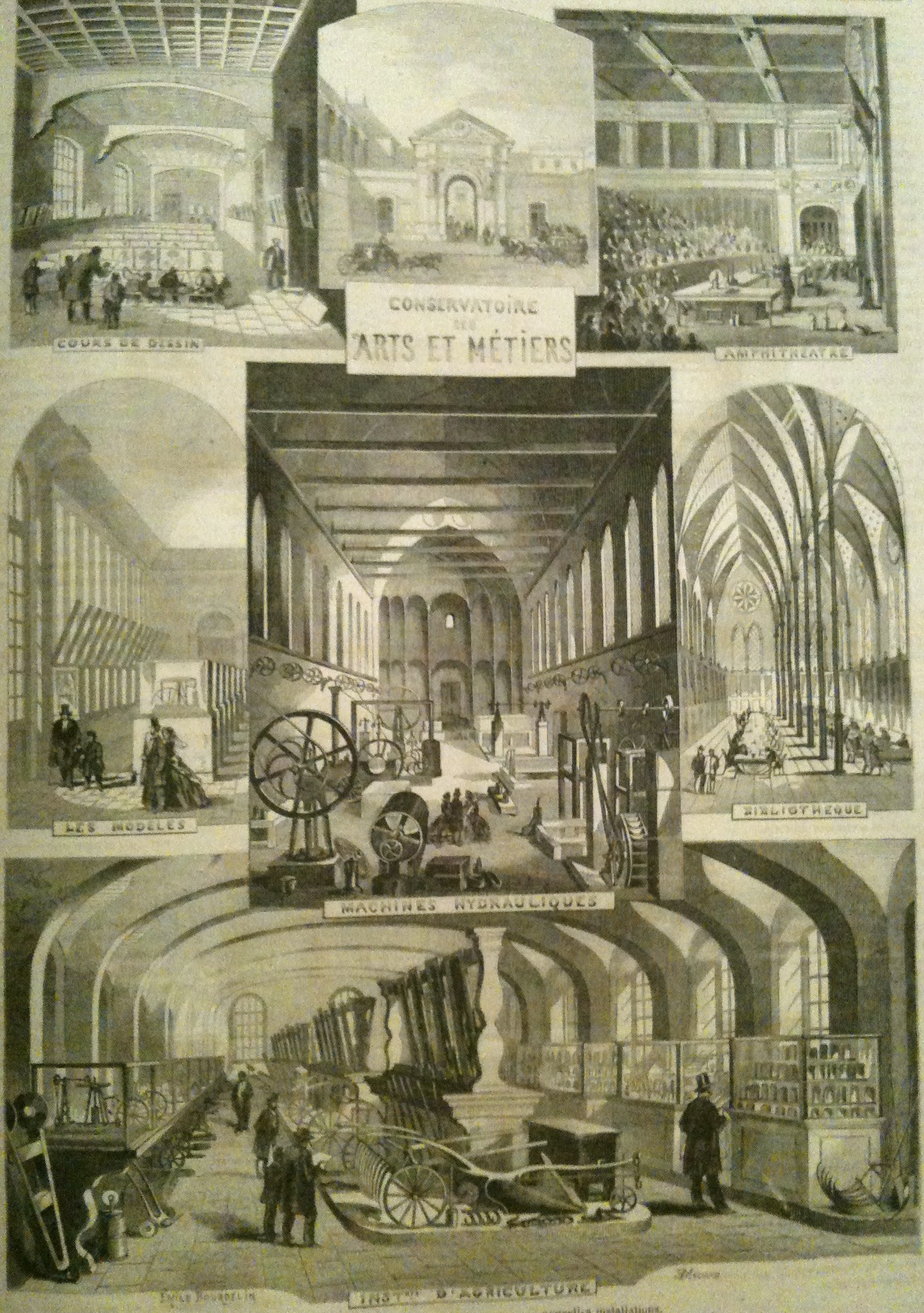 Salles rénovées du Conservatoire national des arts et métiers.